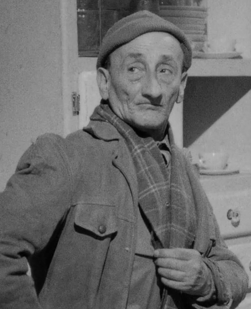 scena dal film I soliti ignoti